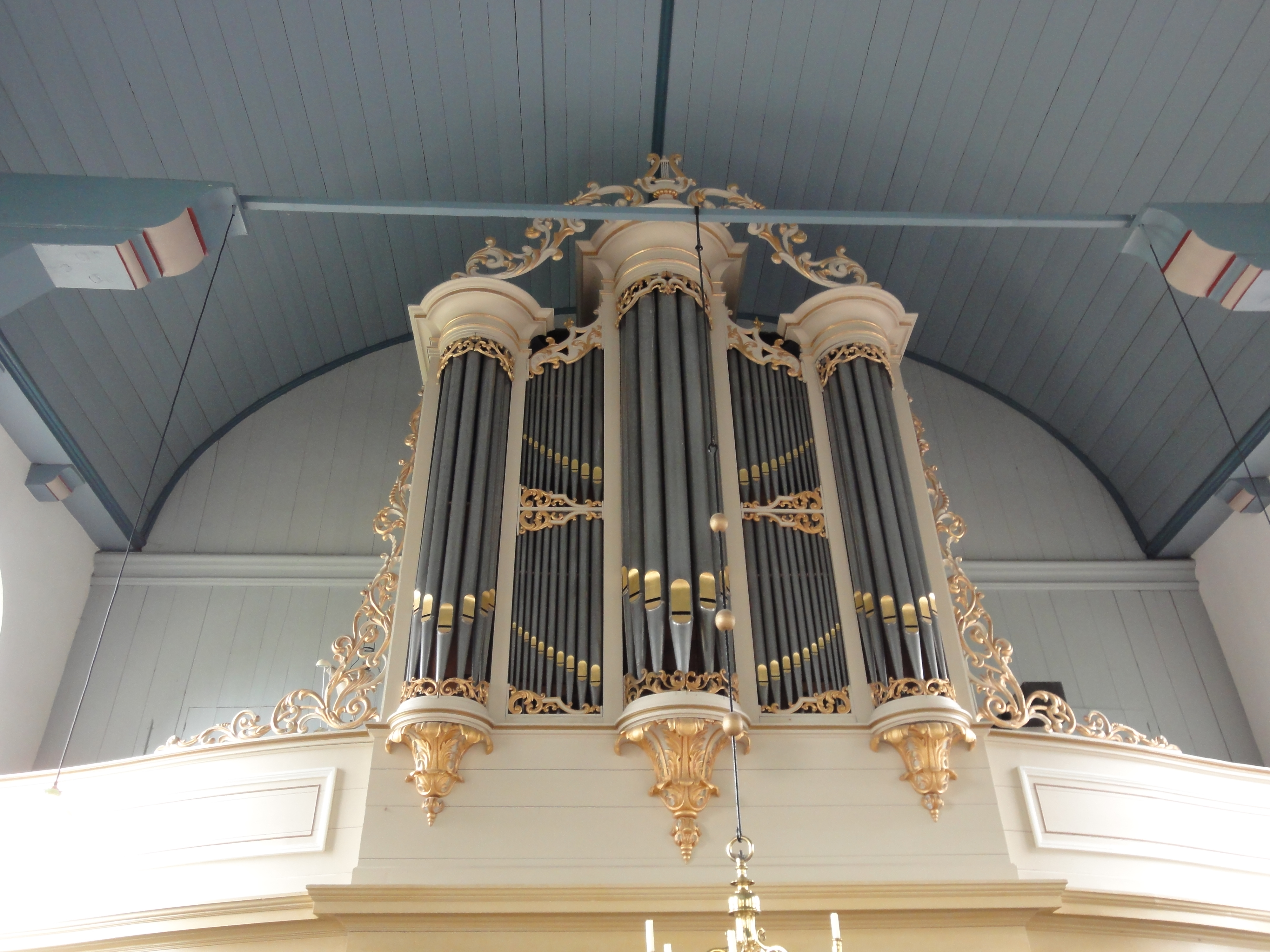 Die Orgel in der kirche in Grootschermer